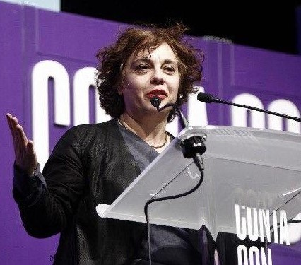 Cierre de campaña electoral para las elecciones generales del 10 de Noviembre de 2019. Acto de campaña de la Coalición Galicia en Común. Ferrol, 7 de noviembre de 2019.